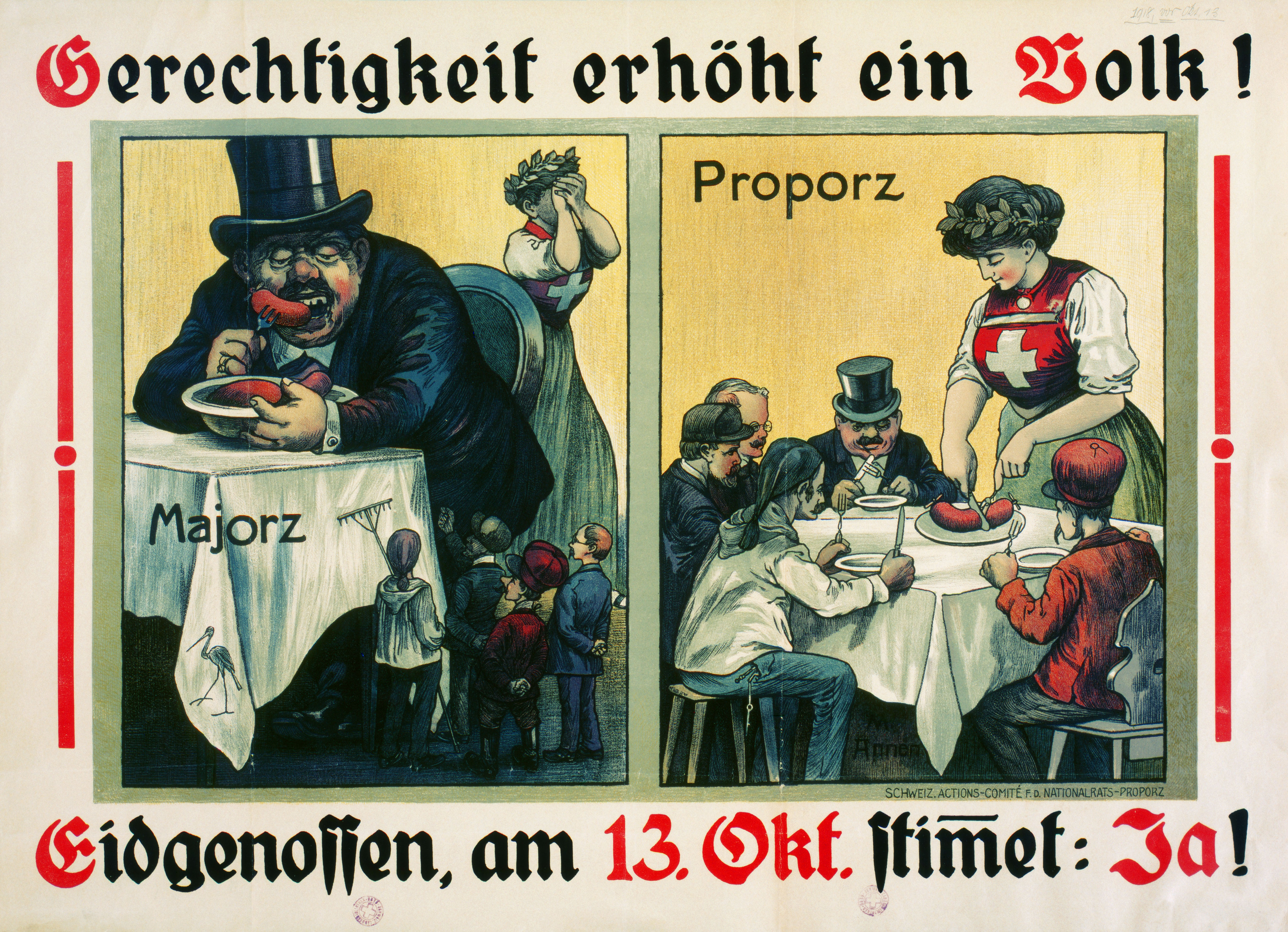 Plakat des «Schweizerischen Actions-Comités für den Nationalrats-Proporz» von 1918